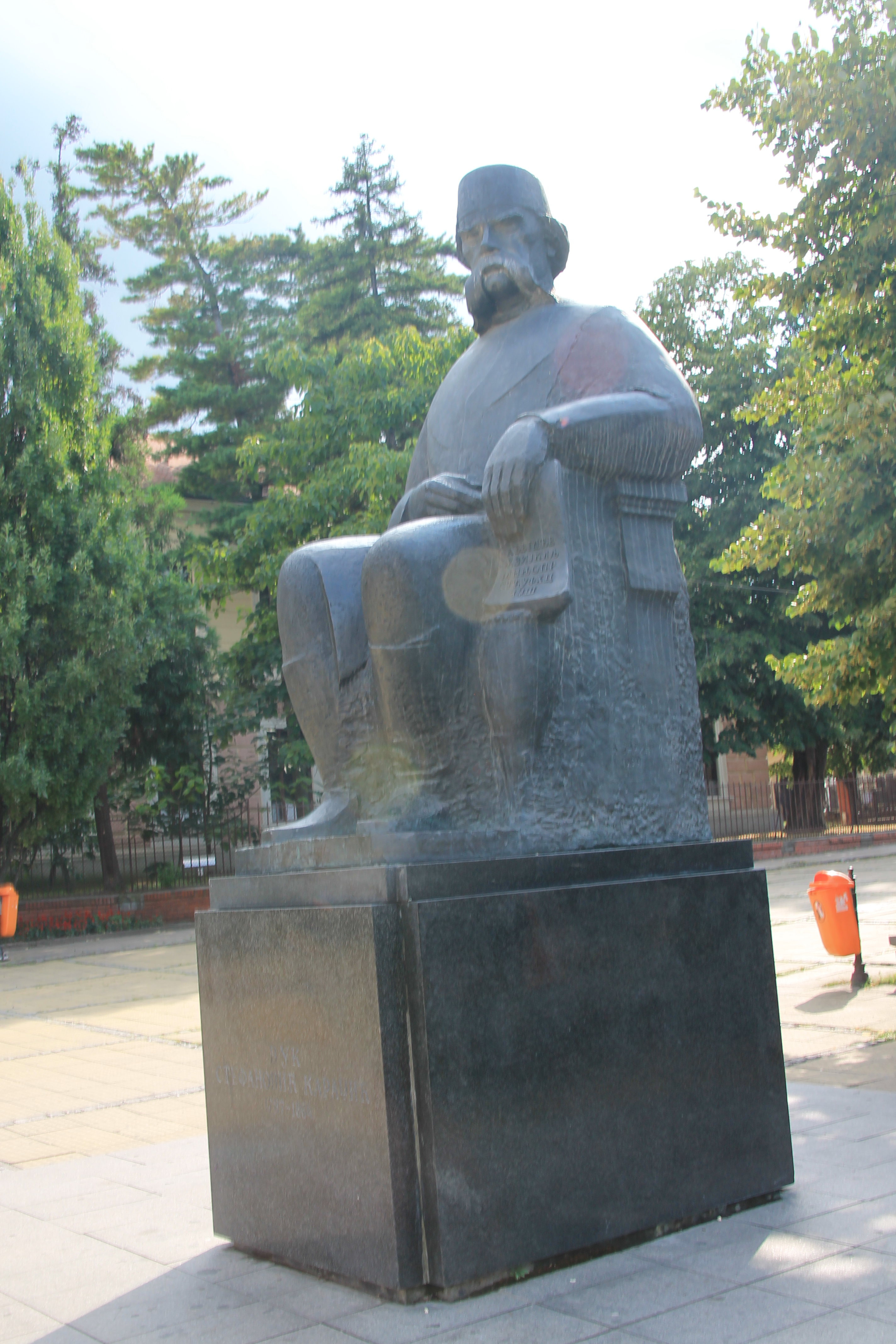 Spomenik Vuku Karadžiću